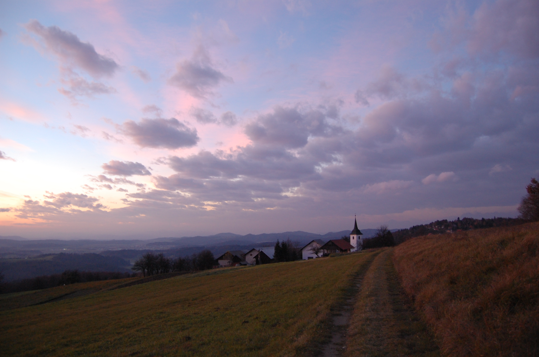 Nova vas, Slovenia